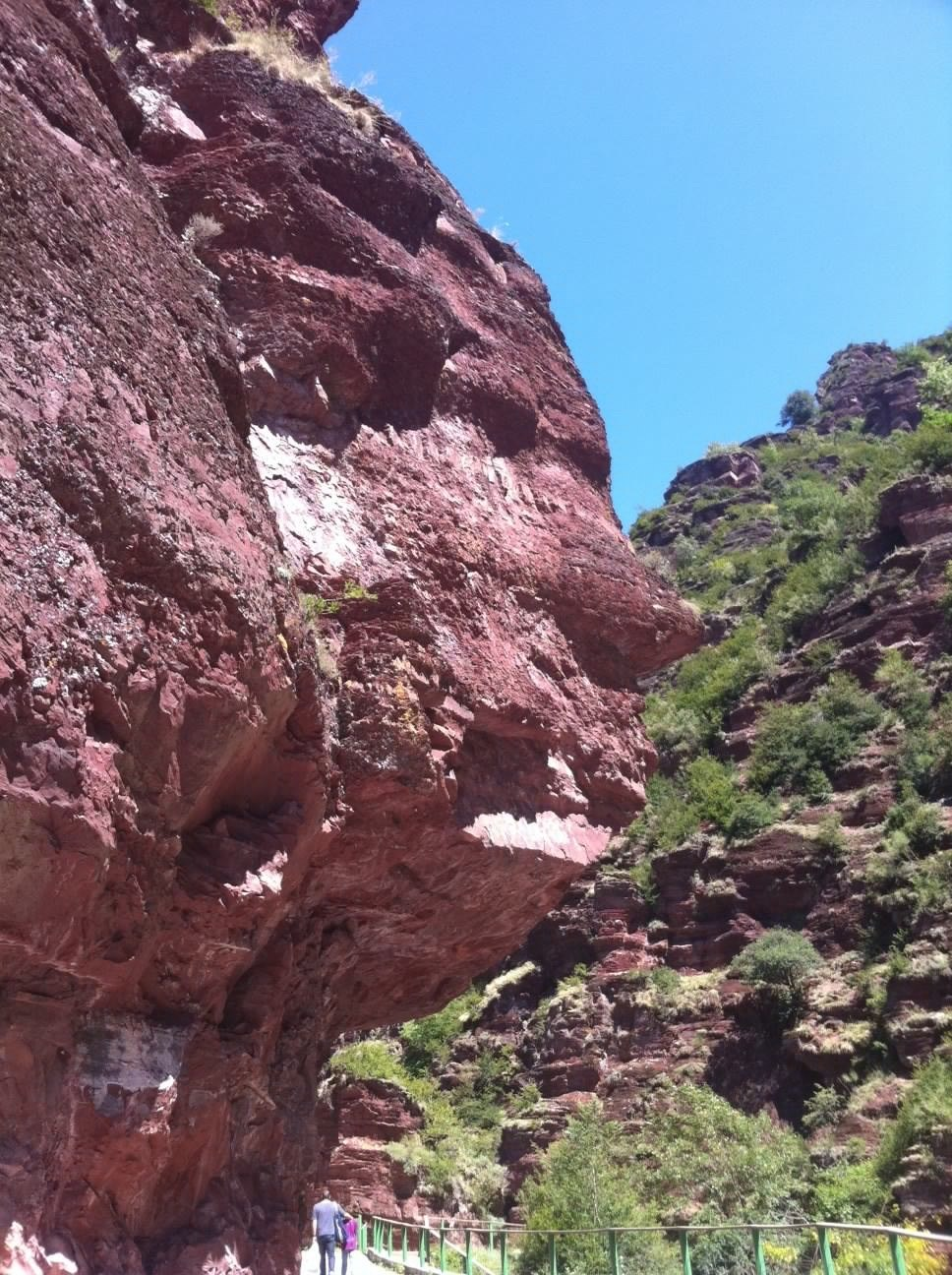 Figure anthropomorphe dans les gorges du Cians (Alpes maritimes, France), surnommée le « visage à la grimace », exemple frappant de paréidolie.